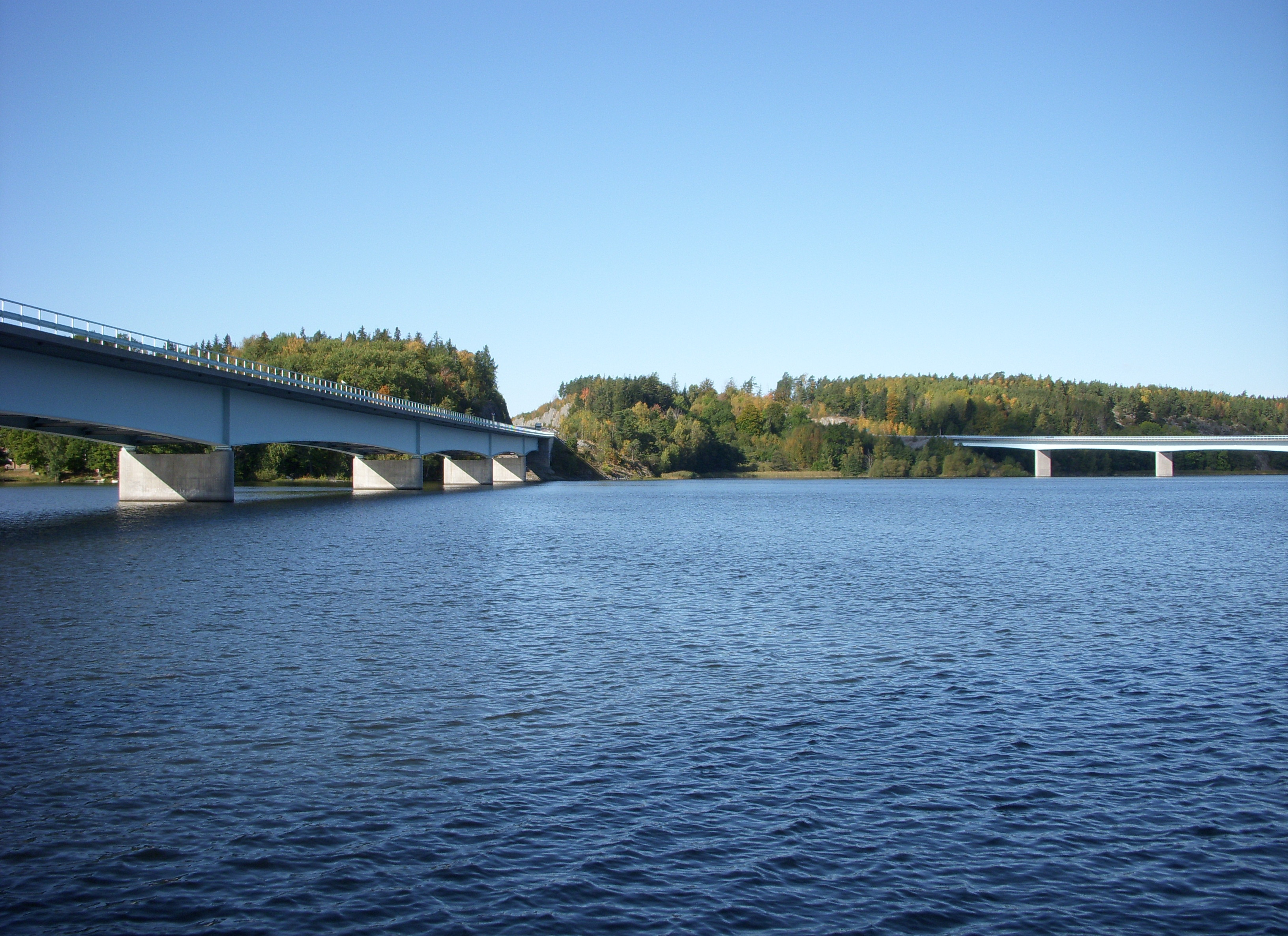 Ekolsundsbroarna 2009